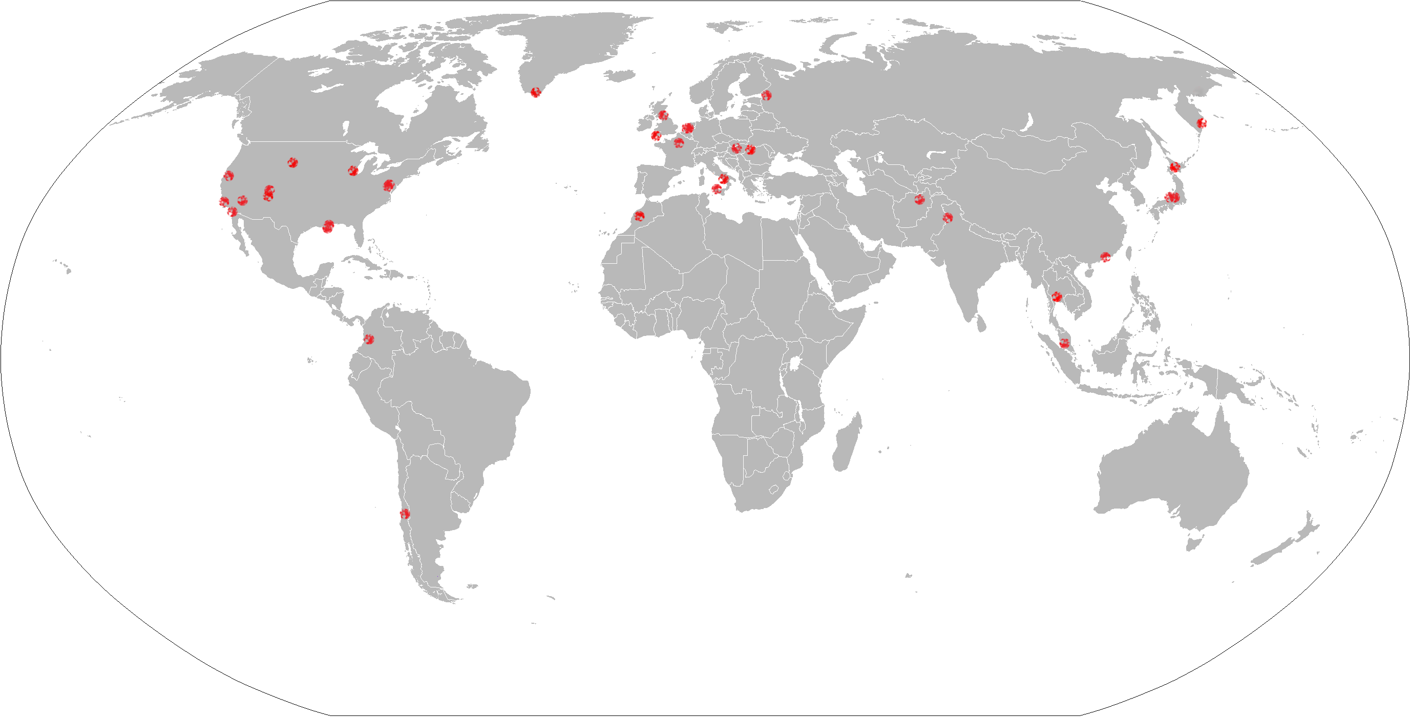 Derived from svg map Image:BlankMap-World3.svg